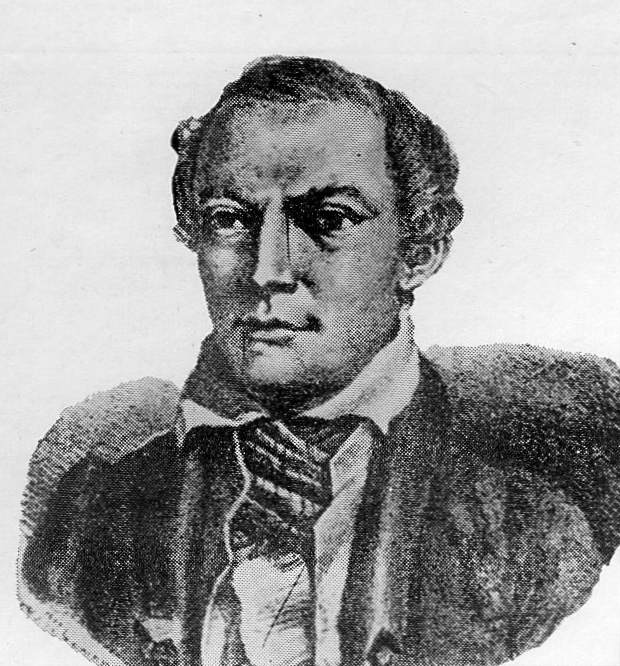 Porträt von Alexander von Oppeln-Bronikowski, aus Zyciorysy znakomitych ludzi, Warschau 1851